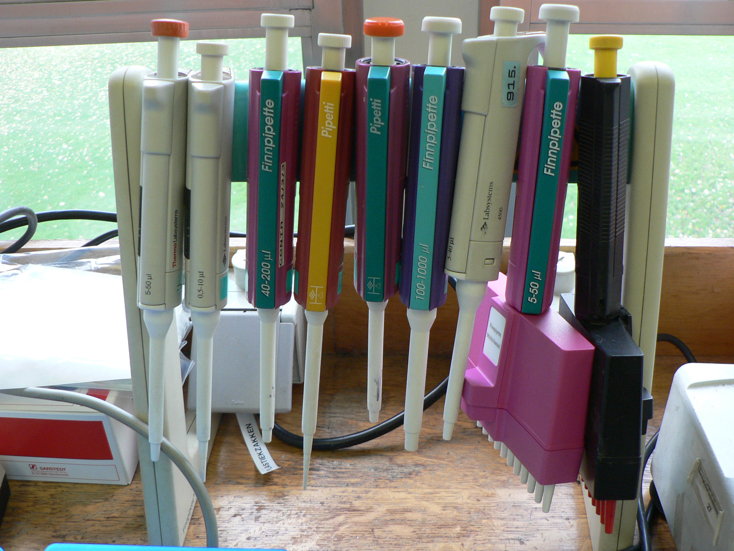 這是微量吸管，不是滴定管。 plastic lab pipettes